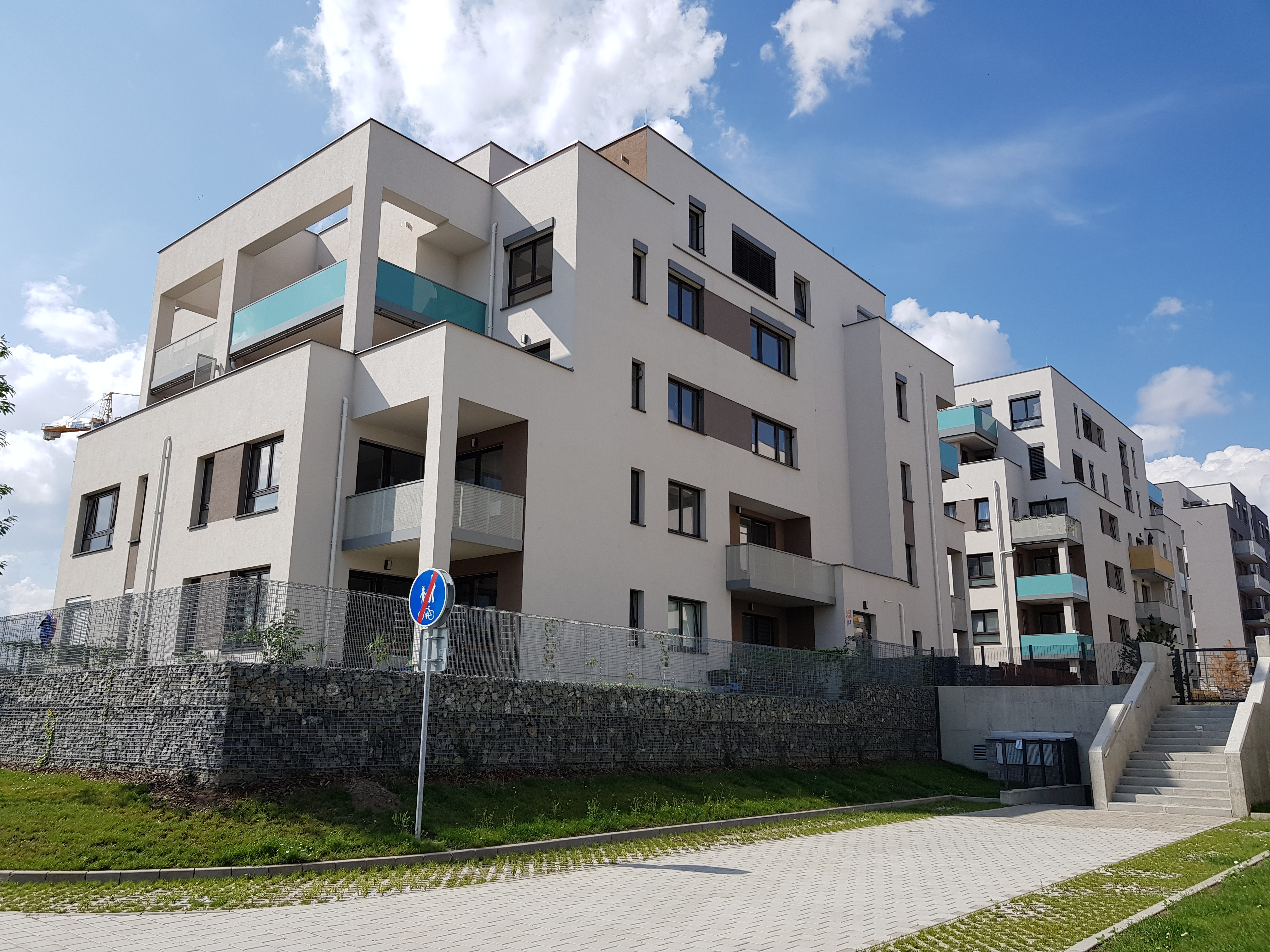 Domy developerského projektu Turku (čp. 1130/11 a 13), Suomi Hloubětín, pohled severozápadním směrem z jižního úseku ulice Revellova, Praha 9-Hloubětín